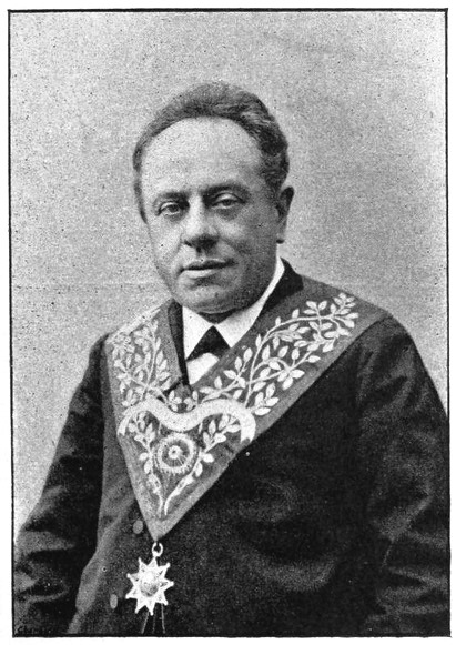 "Louis Amiable". [Jean-Baptiste-Hyppolite-Louis Amiable]